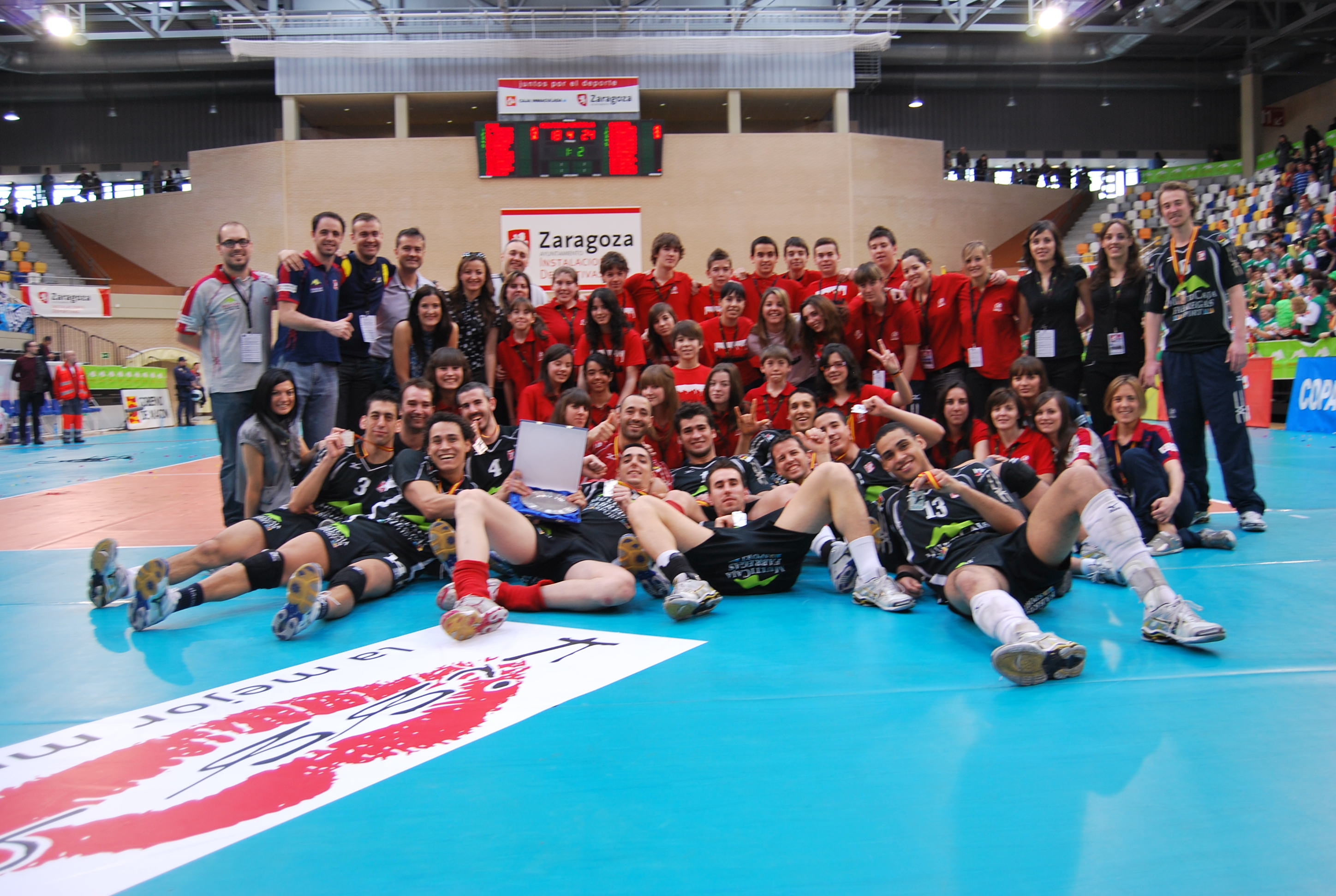 Foto de Subcampeón XXXV Copa del Rey de Voleibol